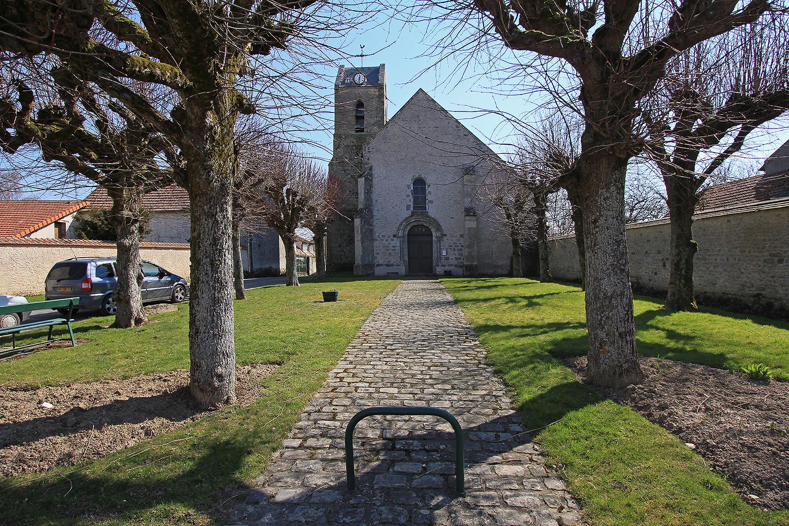 Église de Mespuits. (Essonne, région Île-de-France).